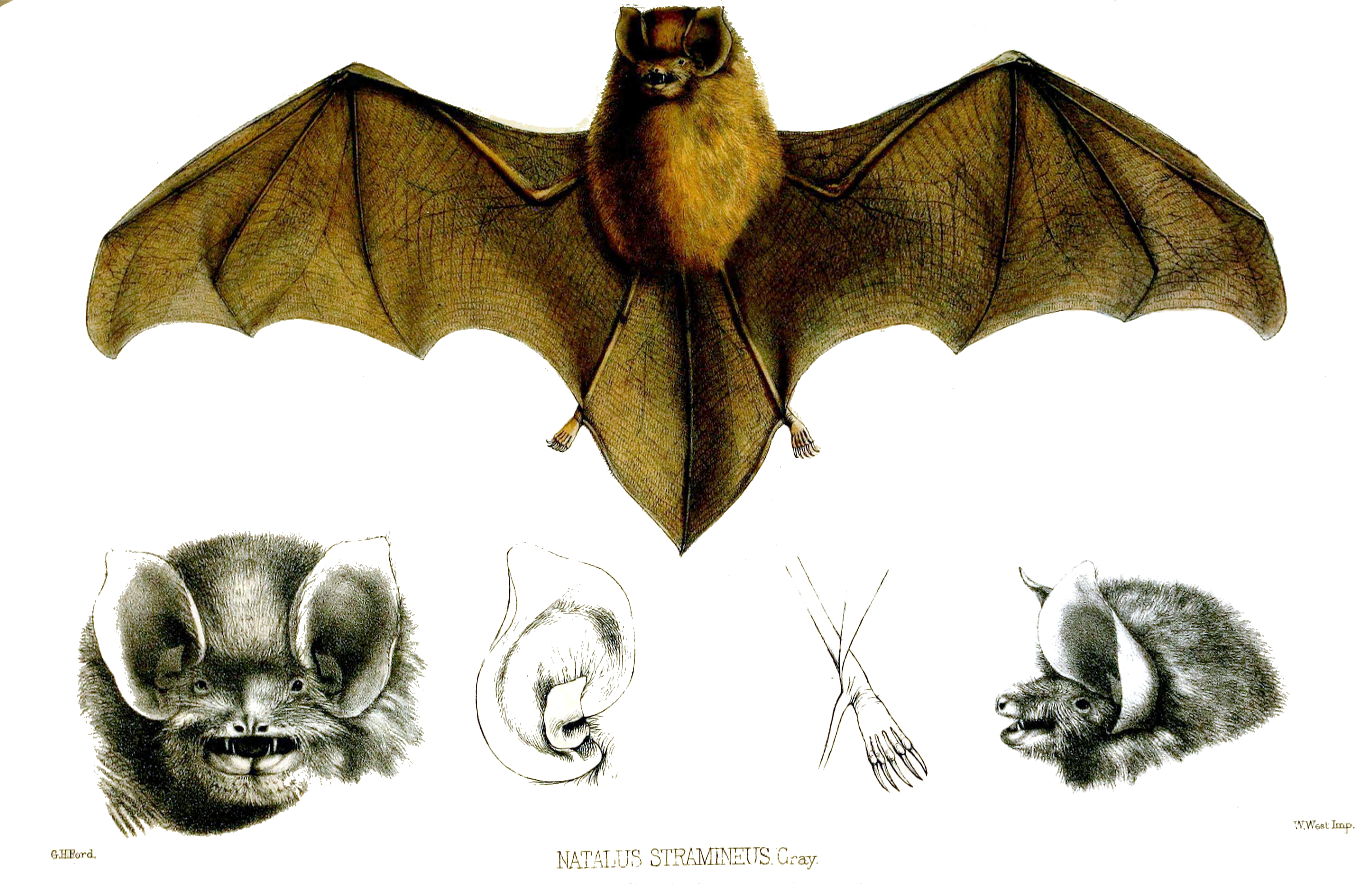 Natalus stramineus